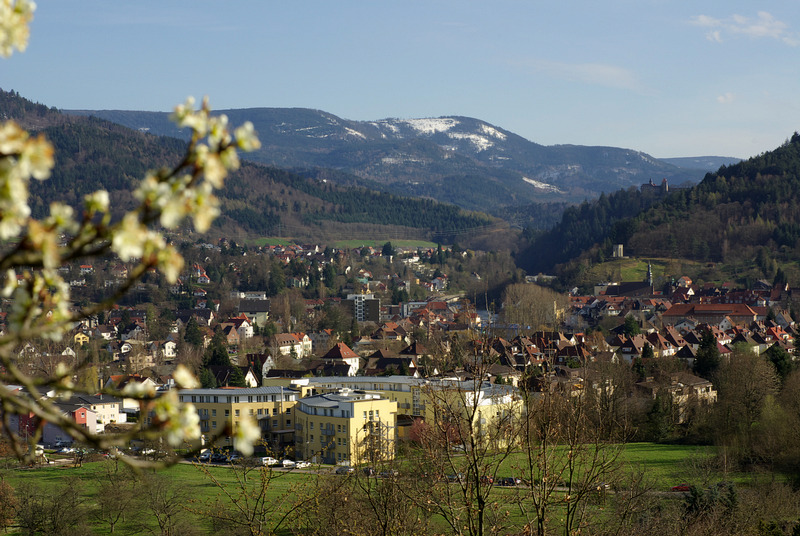 Gernsbach von Norden gesehen; Gernsbach seen from the north